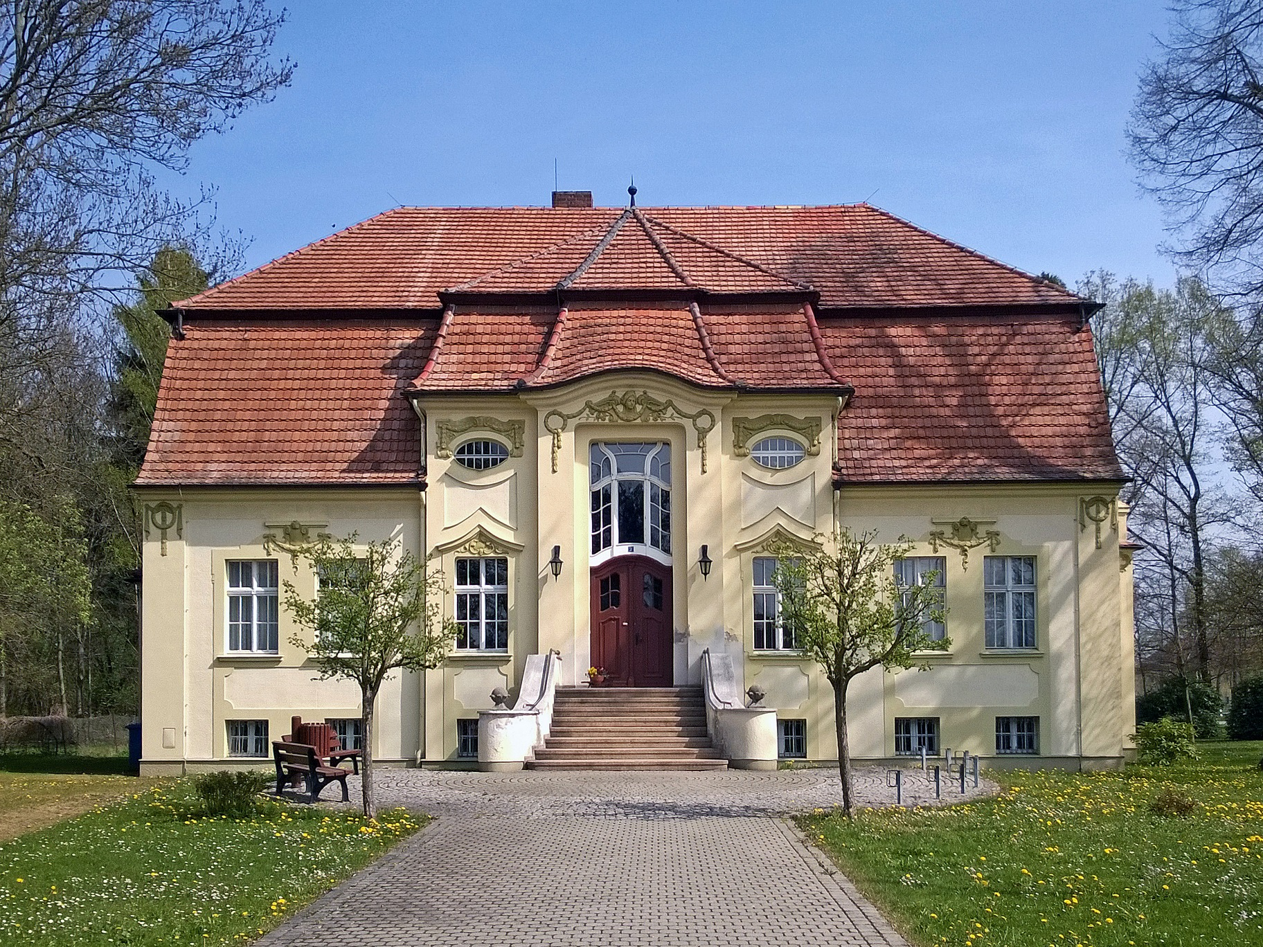 Herrenhaus in Horka, Nutzung als Gemeindeverwaltung